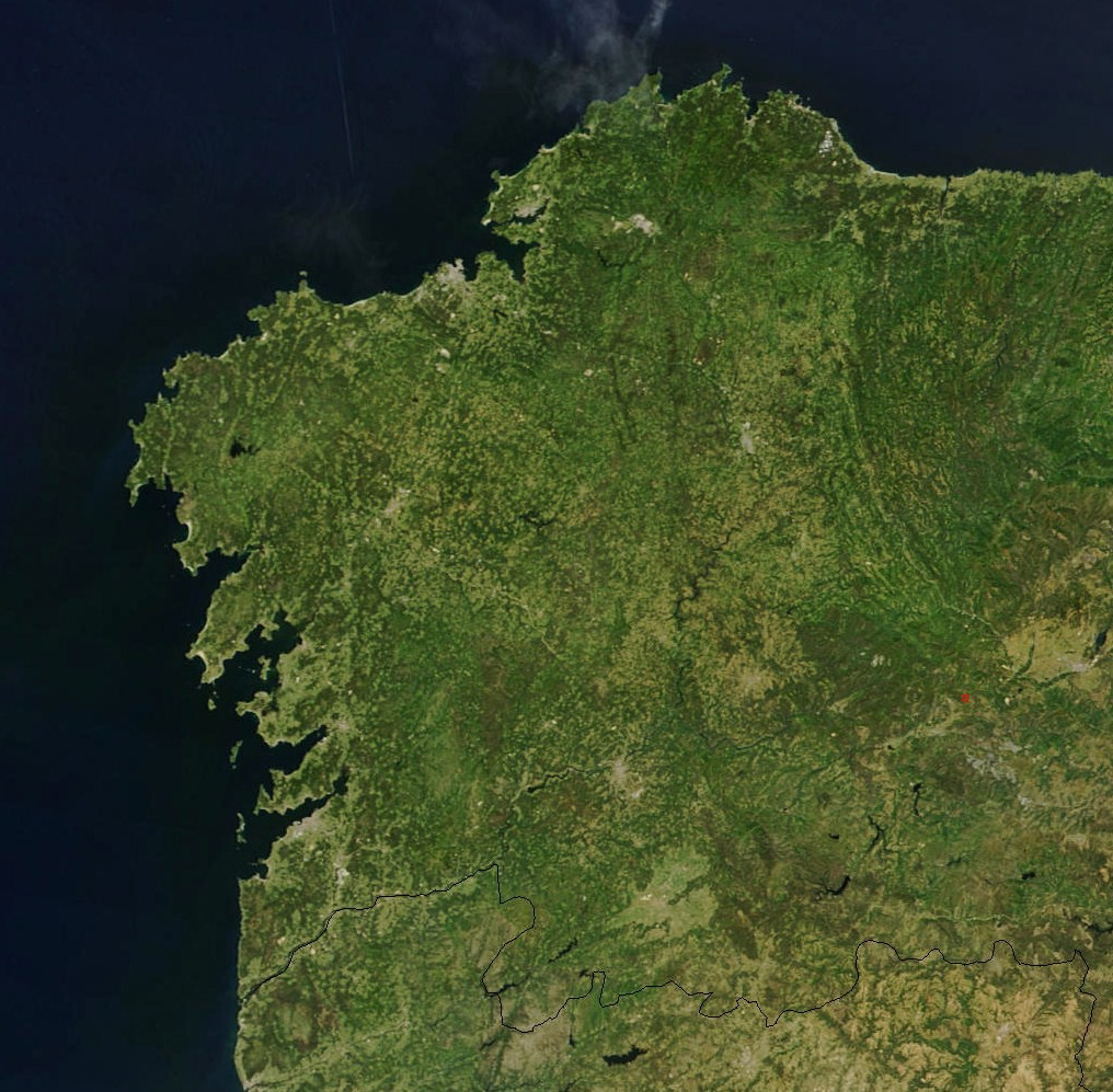 Imaxe de Galicia dende o espazo Licensing